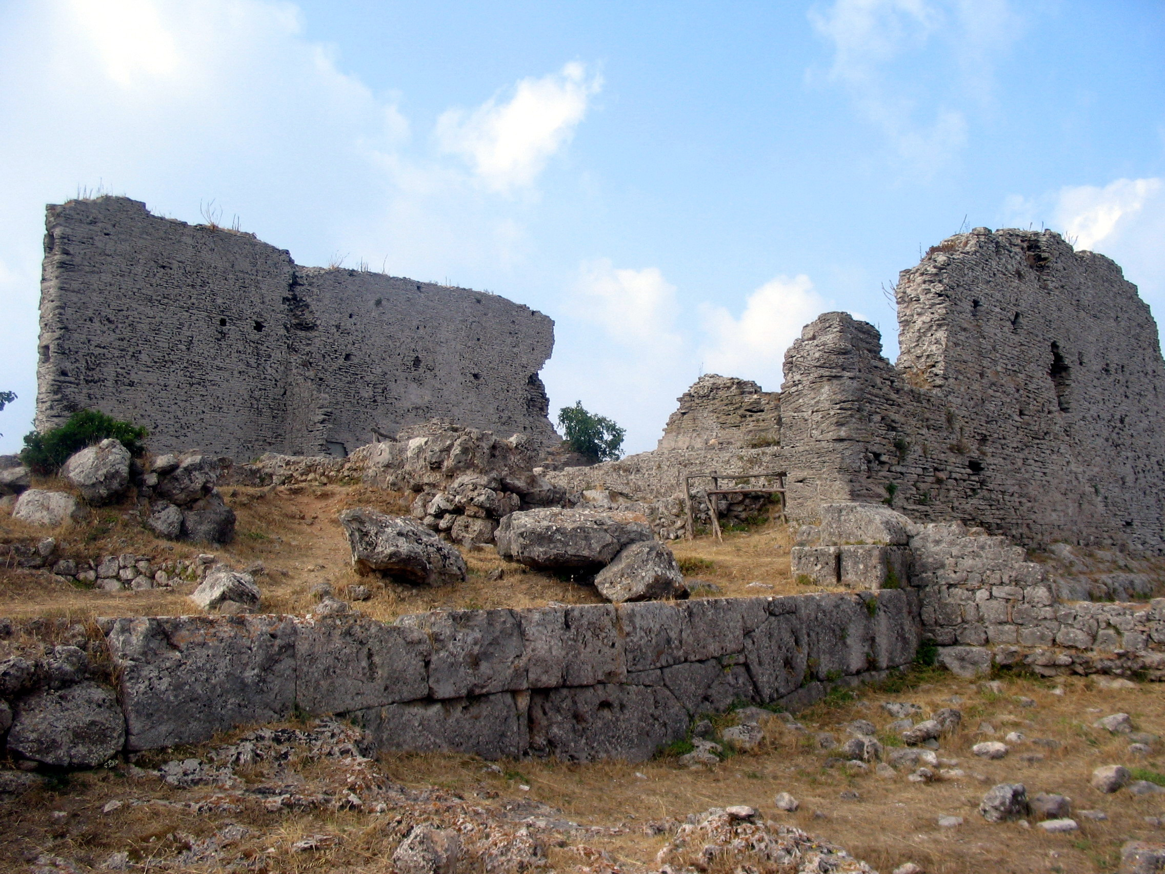 Cosa, Ansedonia, Orbetello, Toscana, Italia